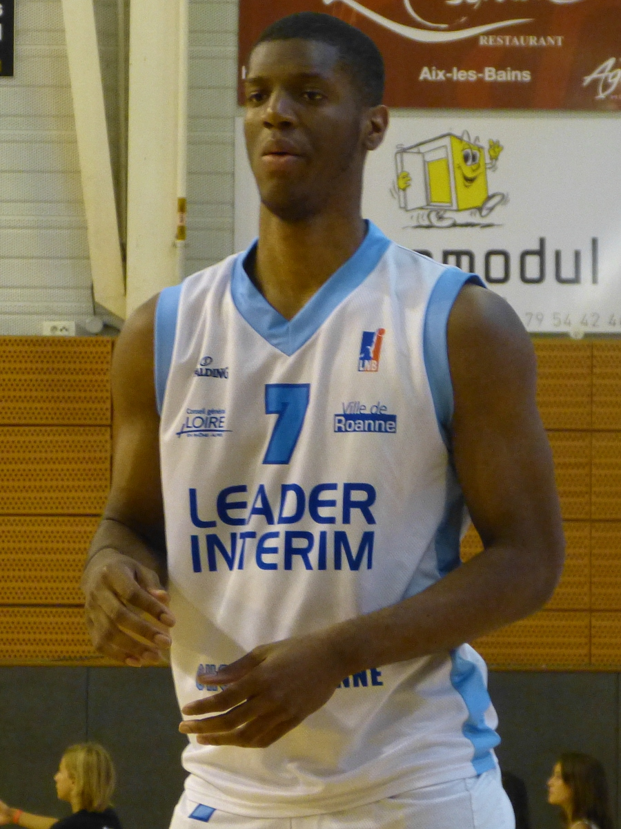 Damien Inglis